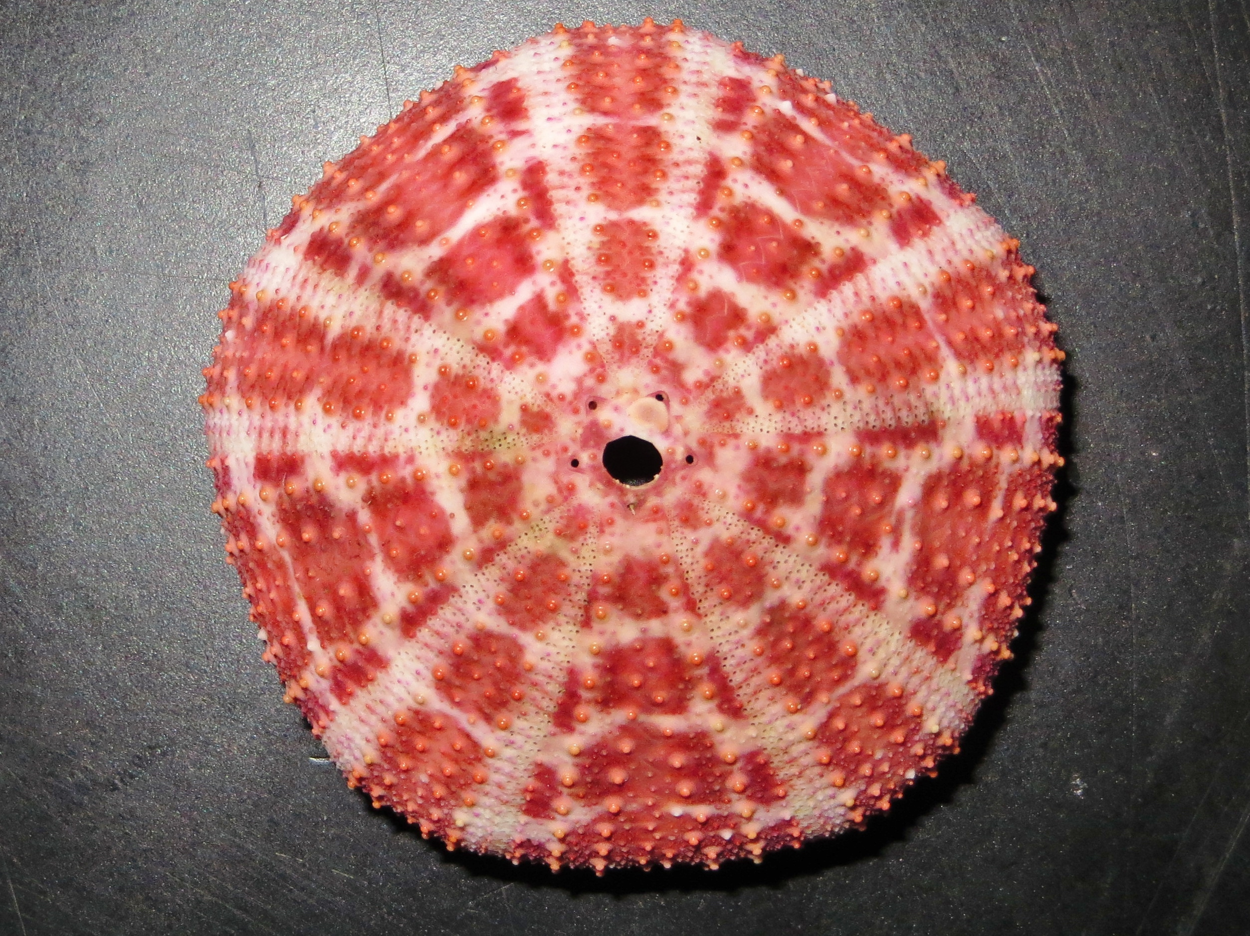 Un test (squelette) d'oursin-fleur Toxopneustes pileolus, trouvé à Mayotte.